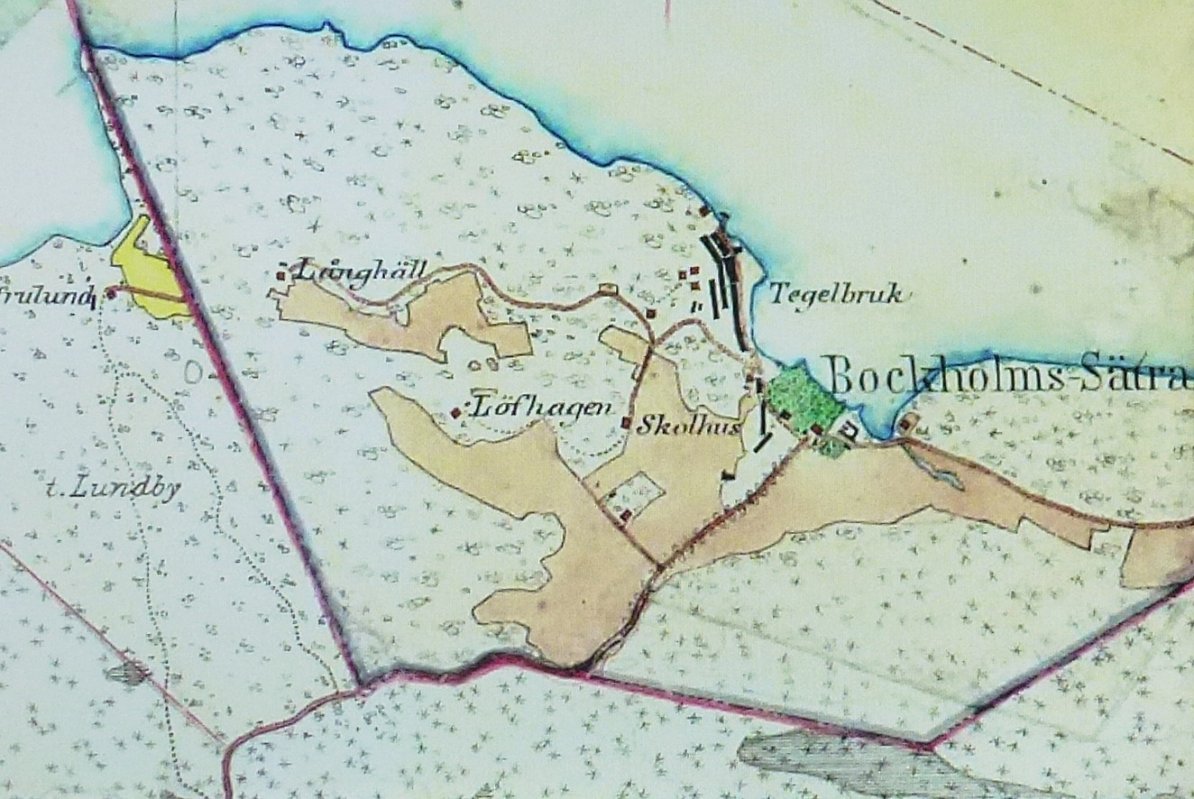 Häradsekonomiska kartan (del av)